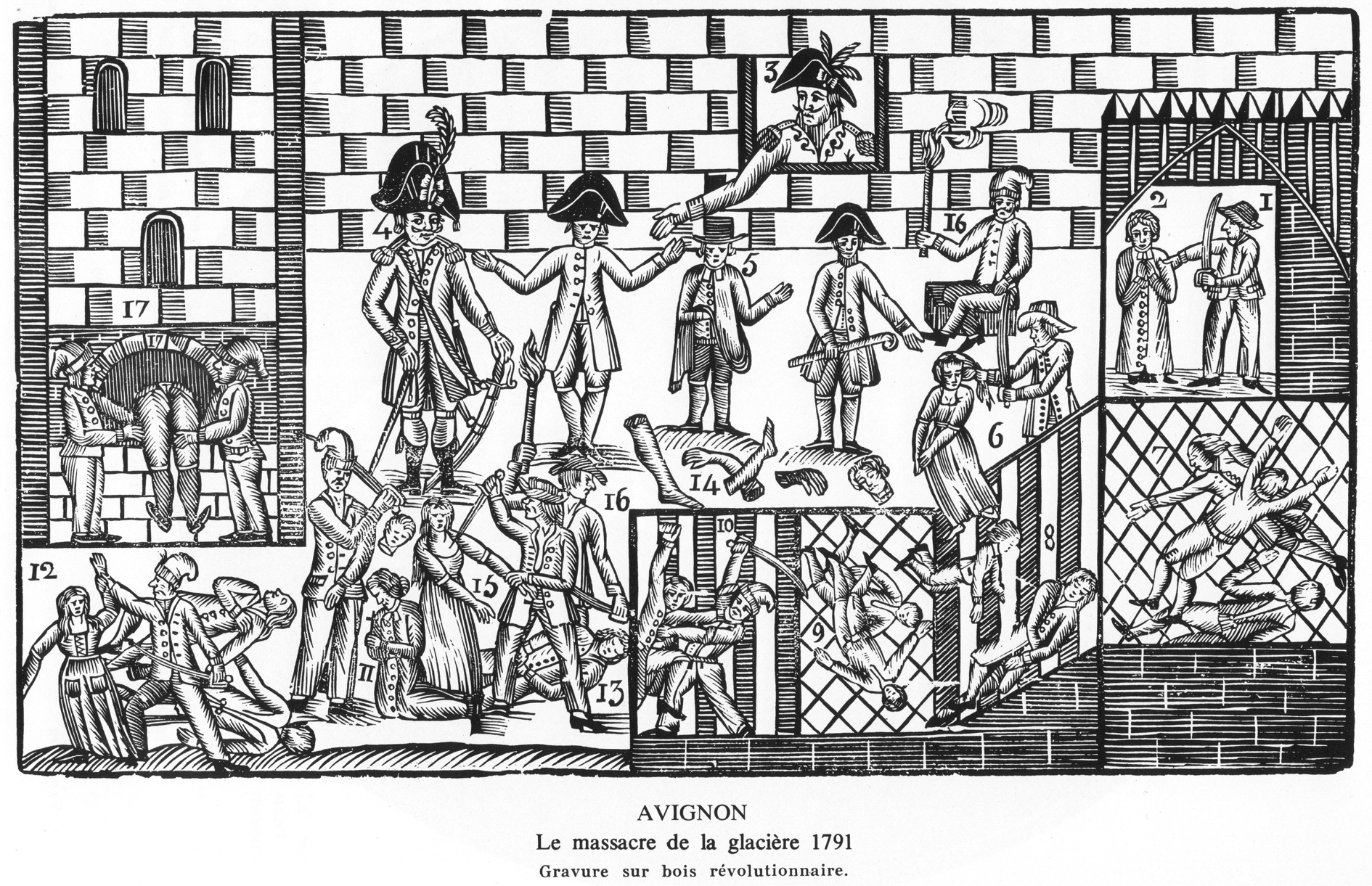 illustration du "massacre de la Glacière" (Avignon, France), gravure sur bois Massacres of La Glacière. This massacre is considered by historians as a last episode in the struggle between partisans and advocates of the reunion of the papal enclave of Avignon and the Comtat Venaissin with the state of France rather than an episode of the French Revolution itself